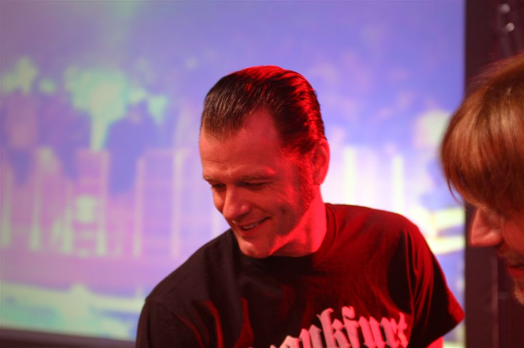 IMG_7354 DJ Dag, Hessentag 2006